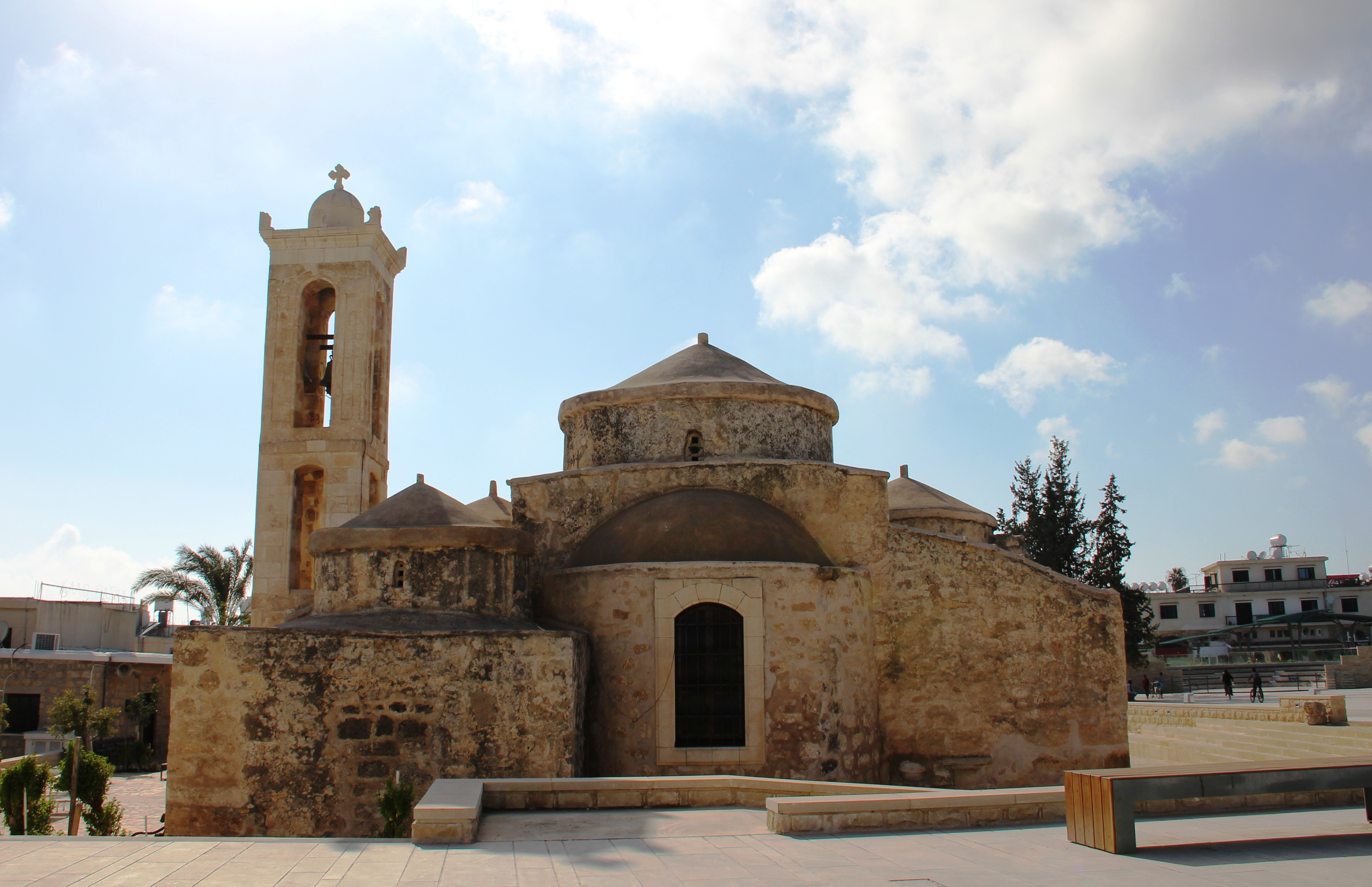 Ayia Paraskevi byzantine church in Yeroskipou, Cyprus